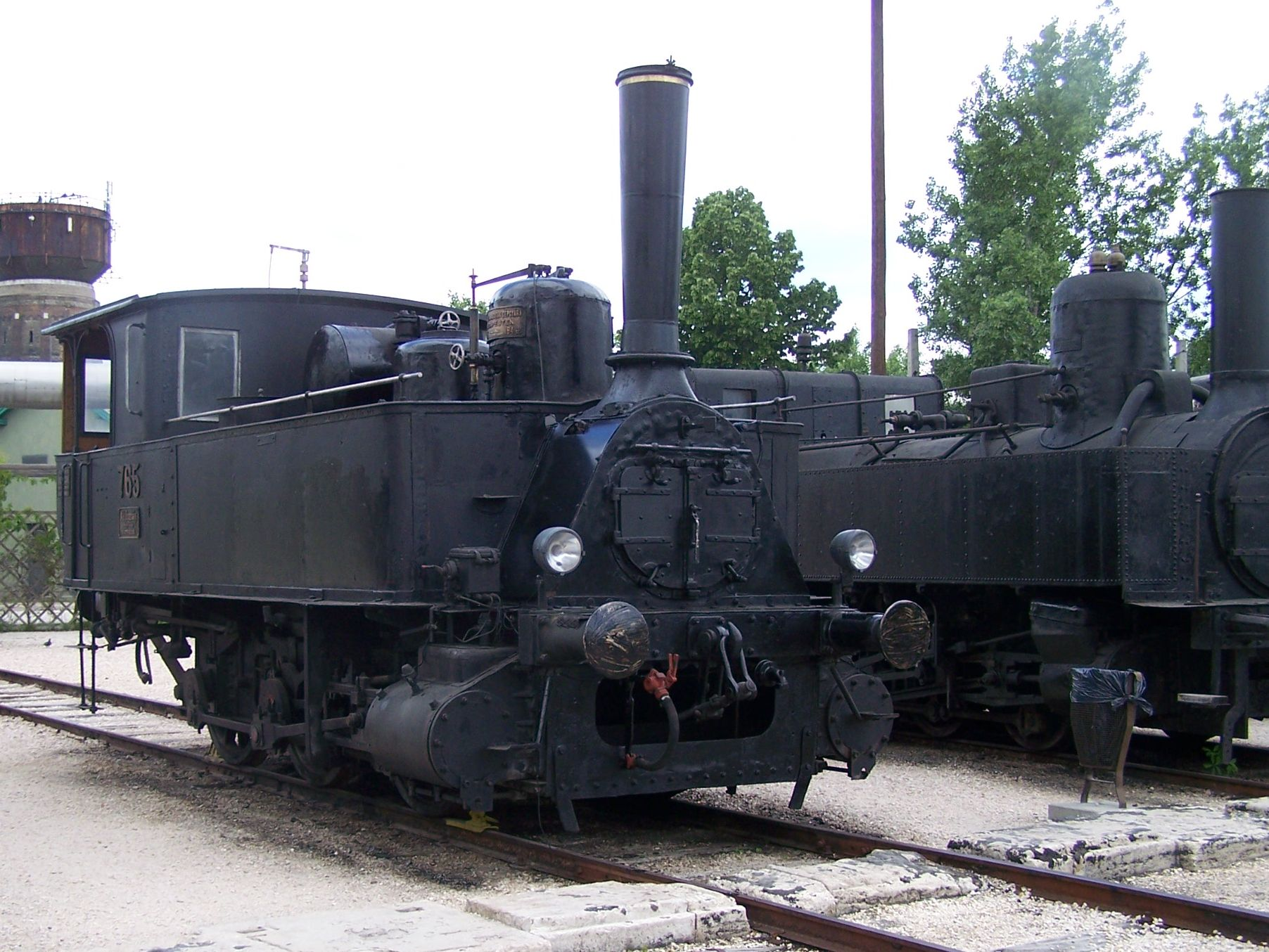 MÁV 377 a Füsti vasúttörténeti parkban